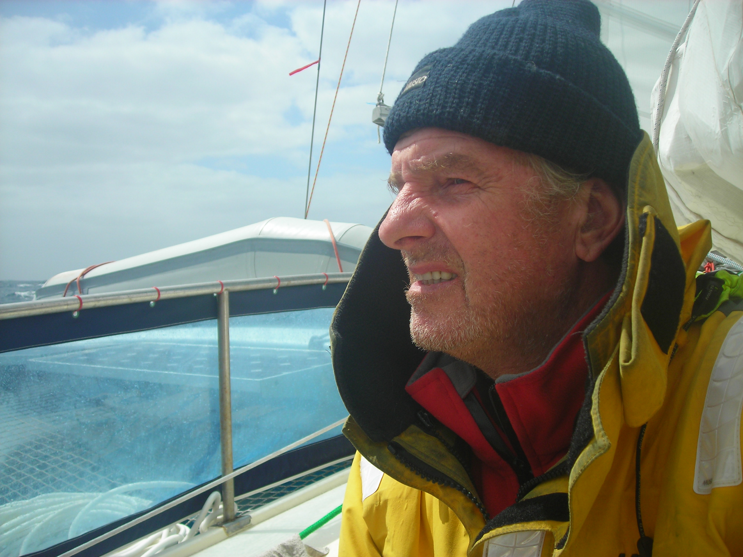 Portrait Henk